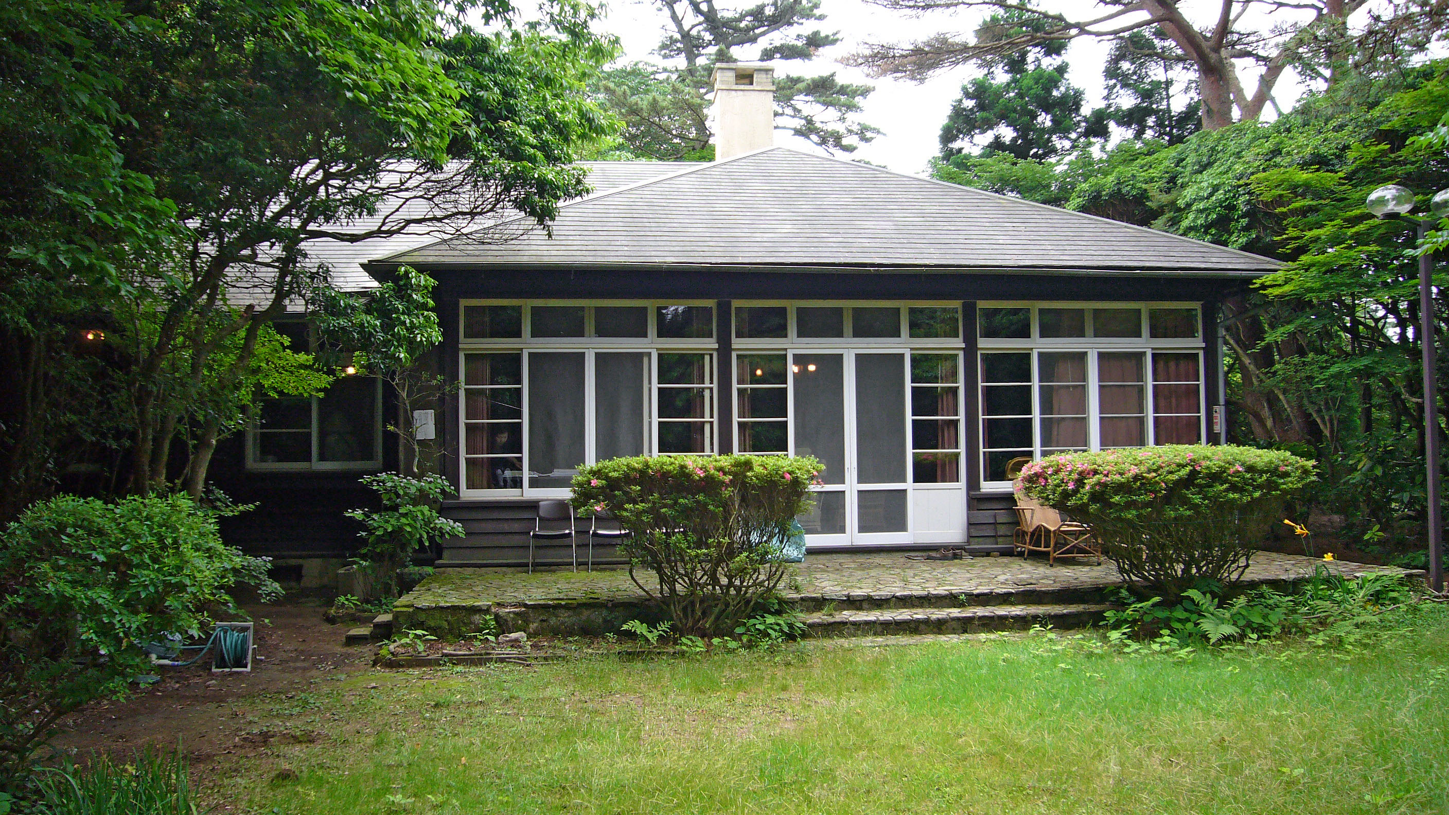 Rokko Mountain Villa in Kobe, Japan